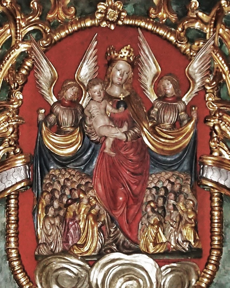 Kath. Pfarrkirche Hl. Martin (Villach), spätgotische Schutzmantelmadonna mit Kind im Marienaltar